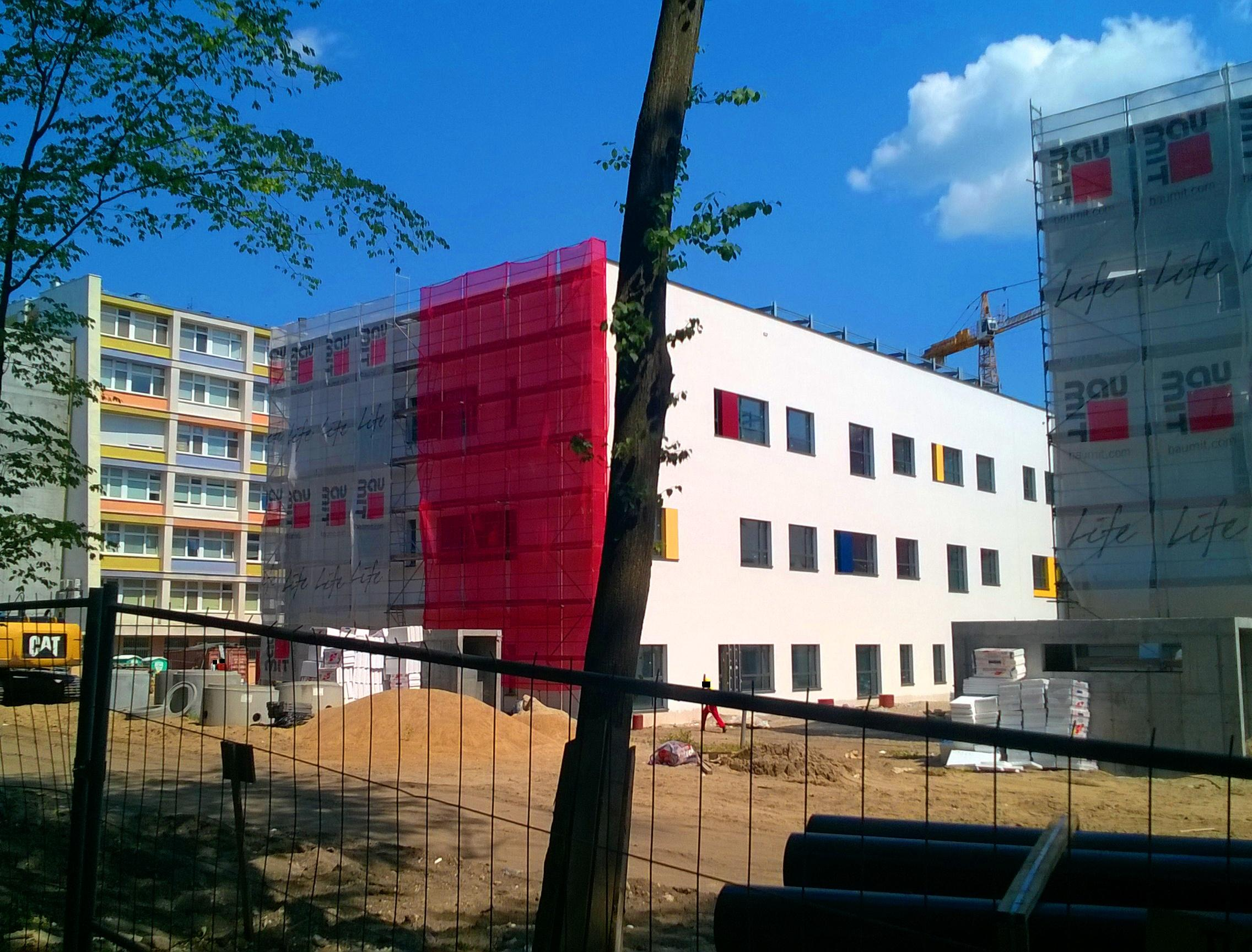 Rozbudowa WSzZ w Toruniu, czerwiec 2018